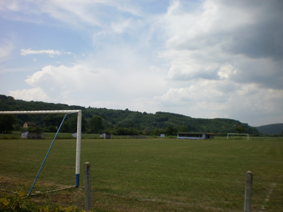 Игралиште ФК Млади радник Ново Ланиште